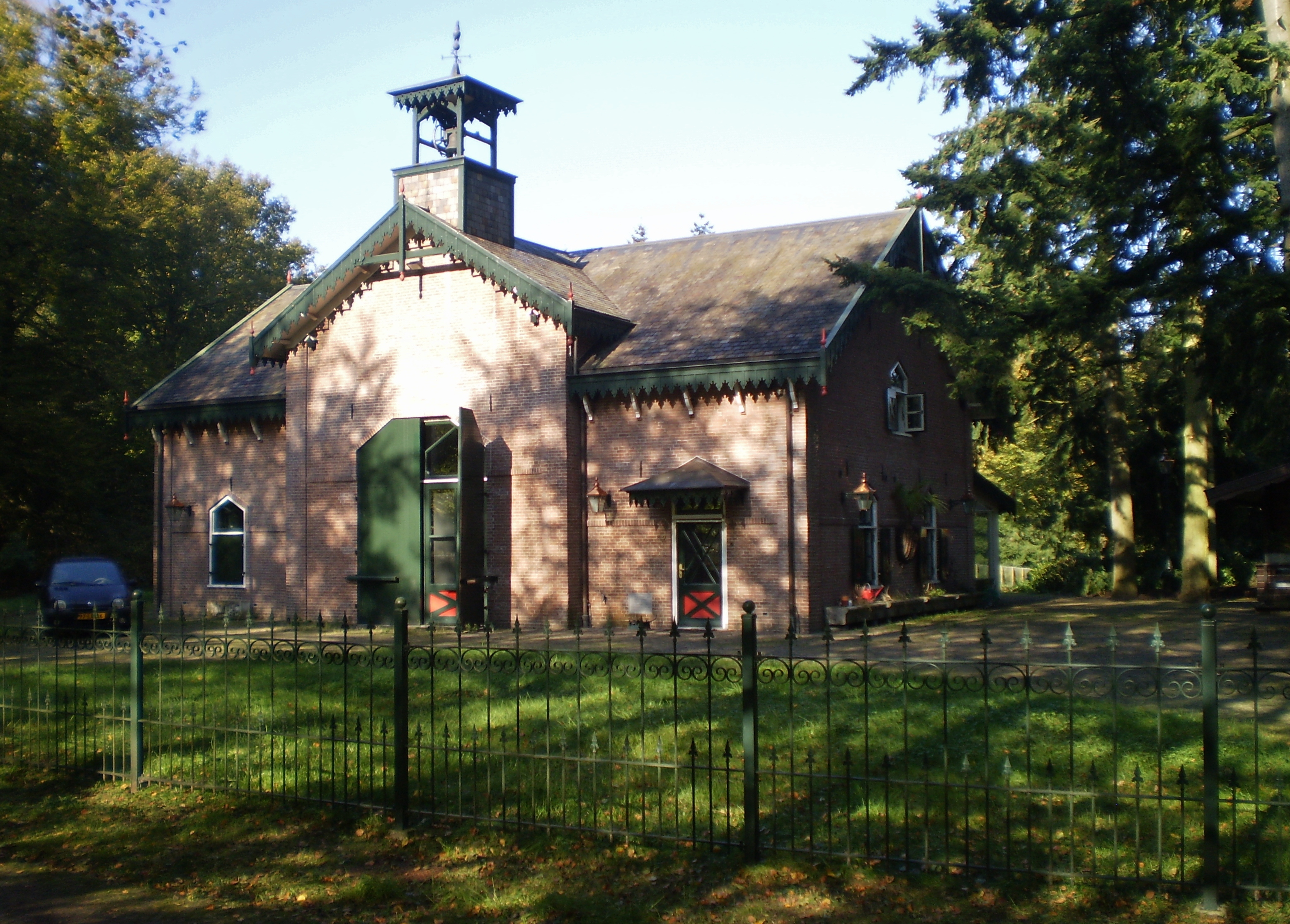 Koetshuis in oktober 2011